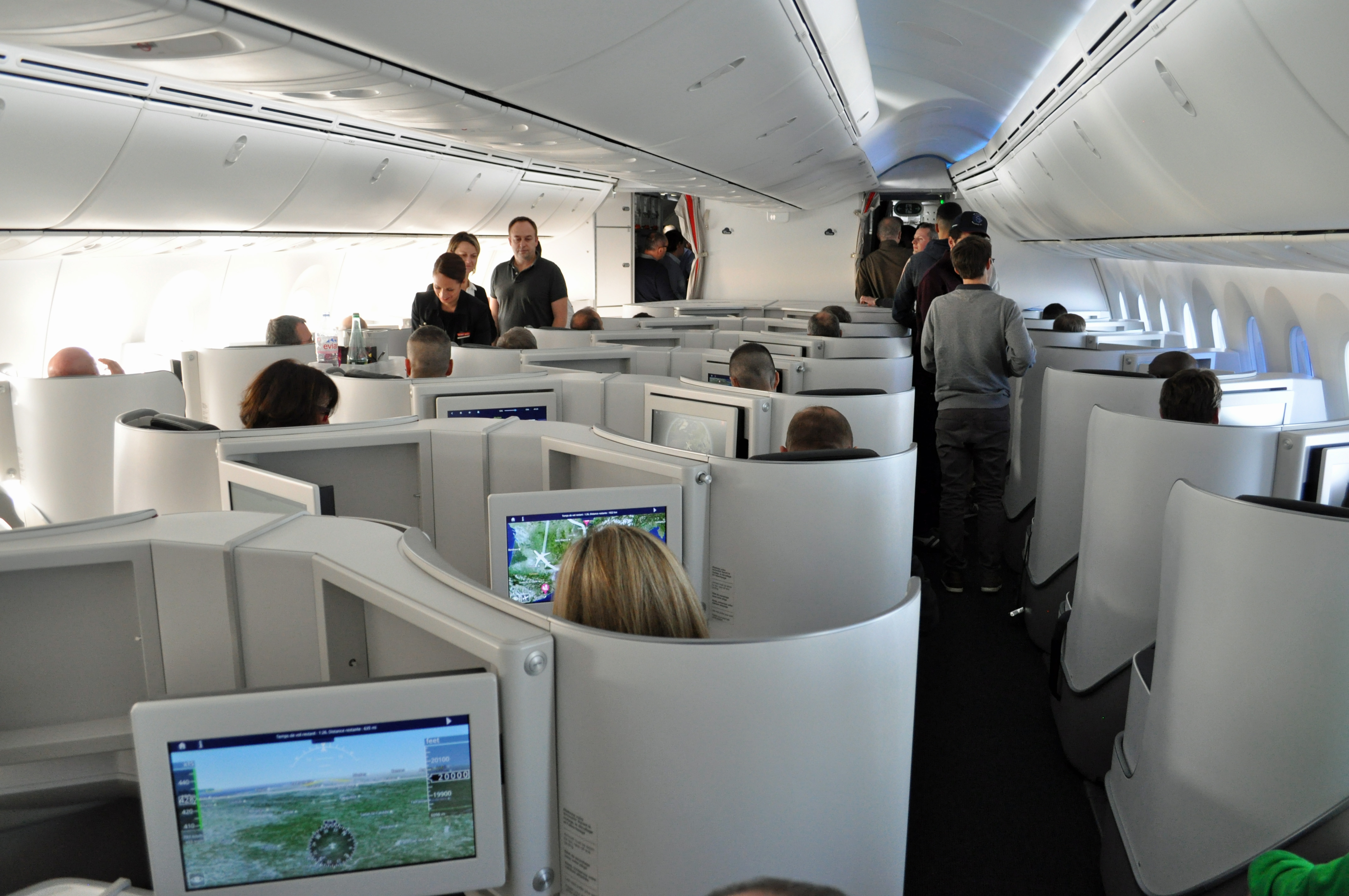 MSN 500 787-9 AIR FRANCE